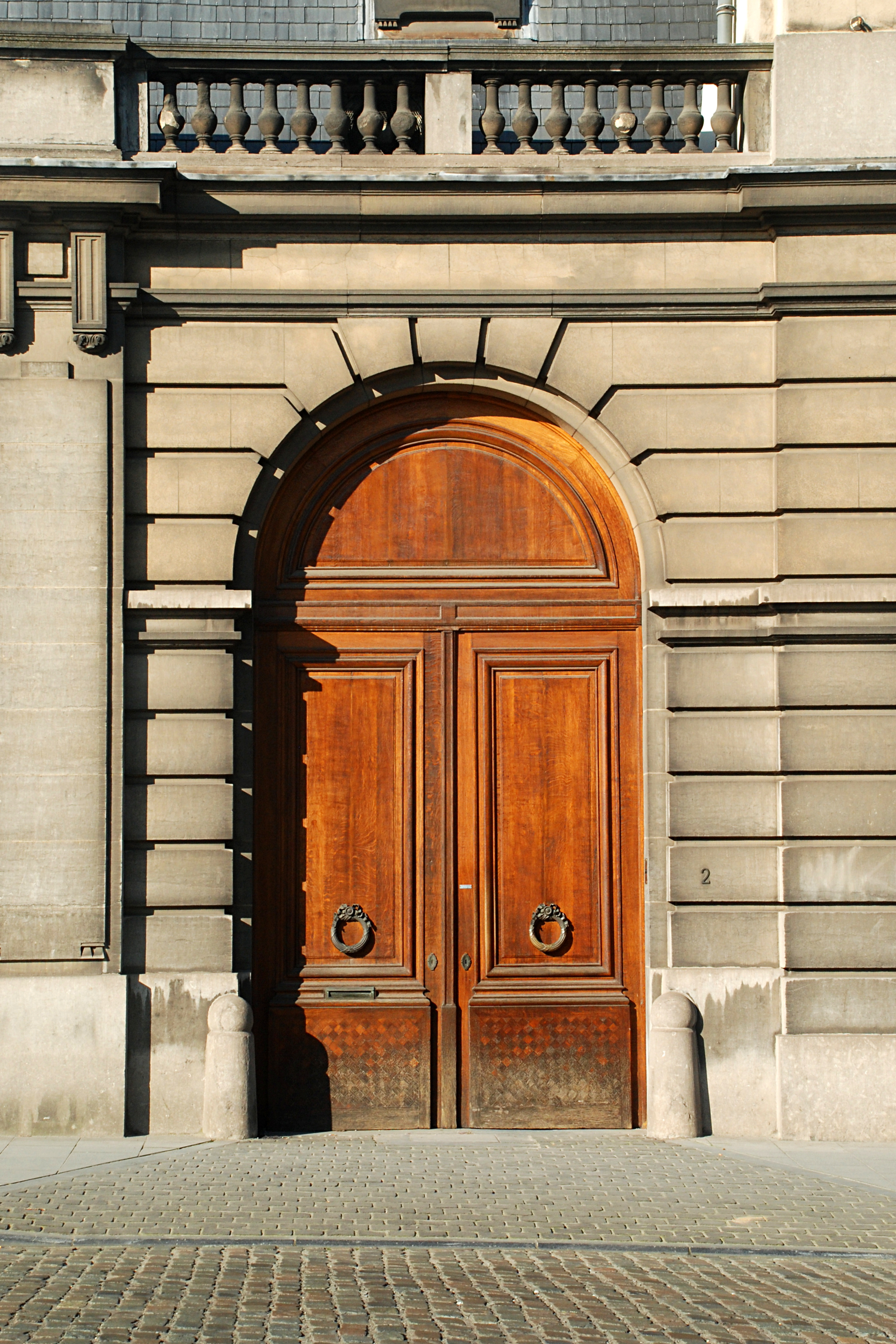 Belgique - Bruxelles - Hôtel de la Liste civile